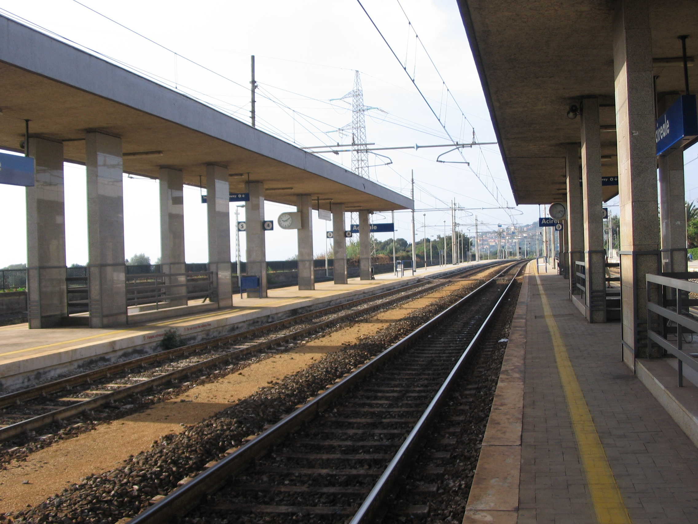 Stazione Acireale